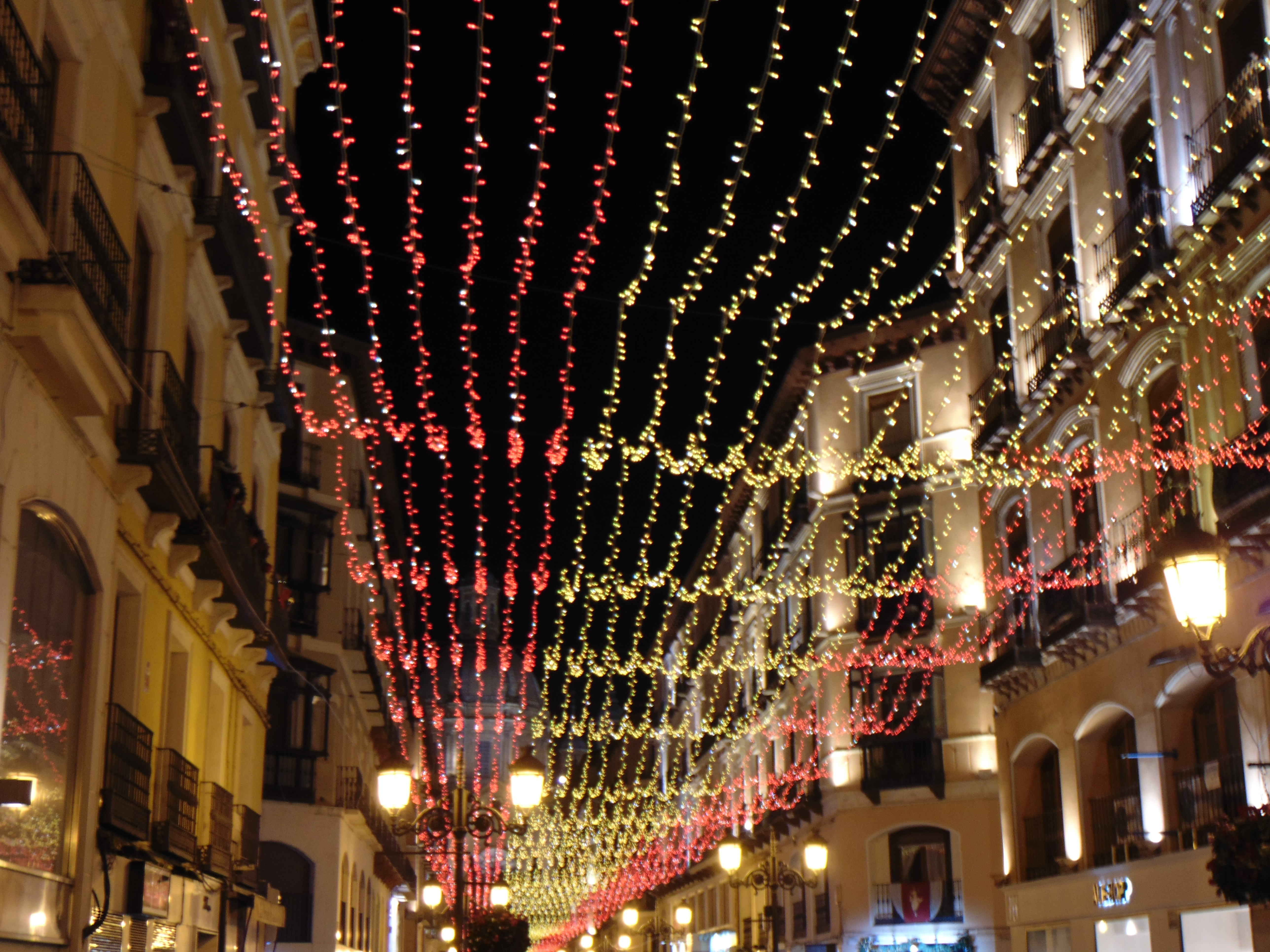 Enlace de interés